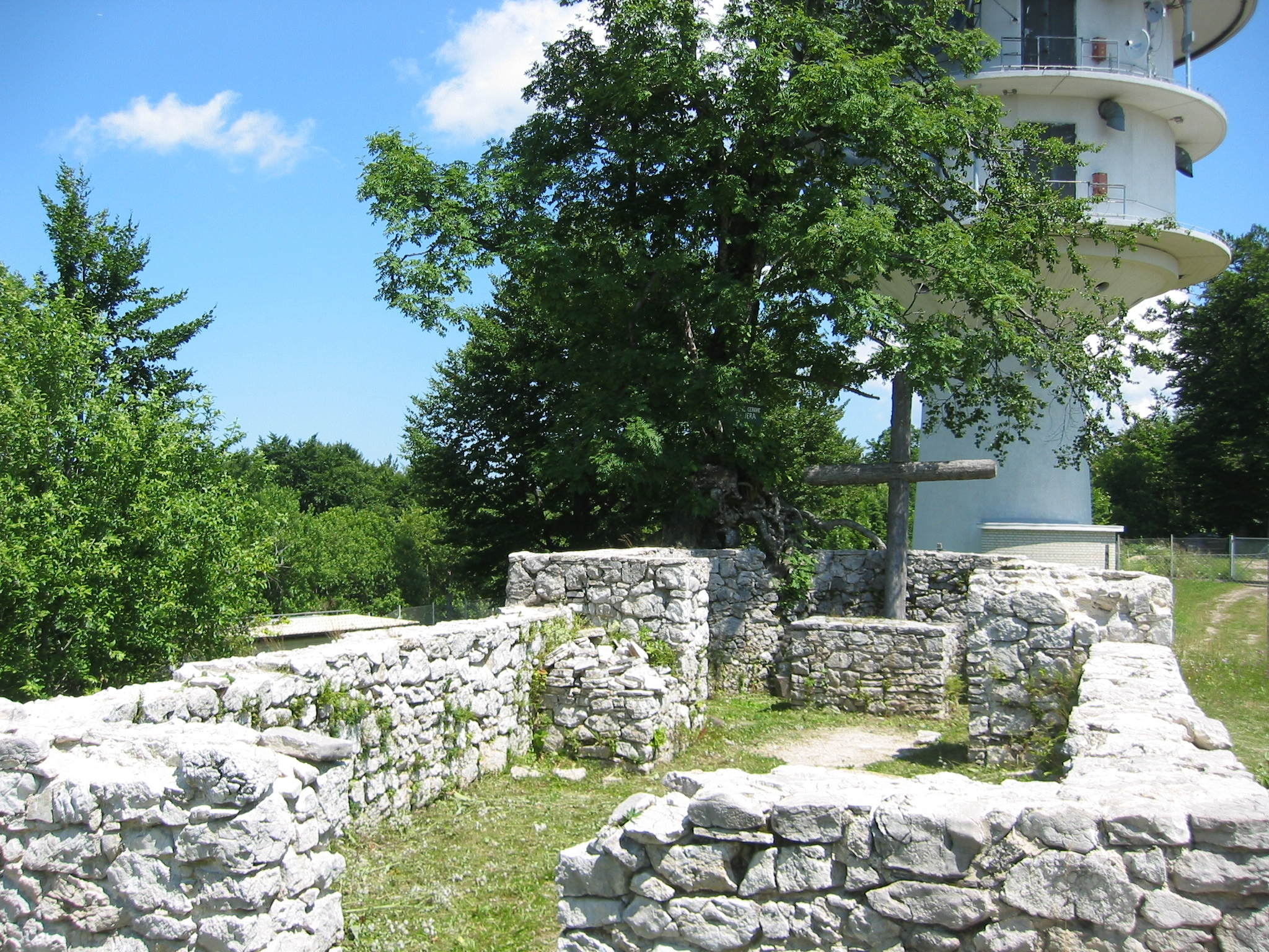 Trdinov vrh ostanki cerkve Sv. Jere / Trdinov vrh, ruins of church St. Jera